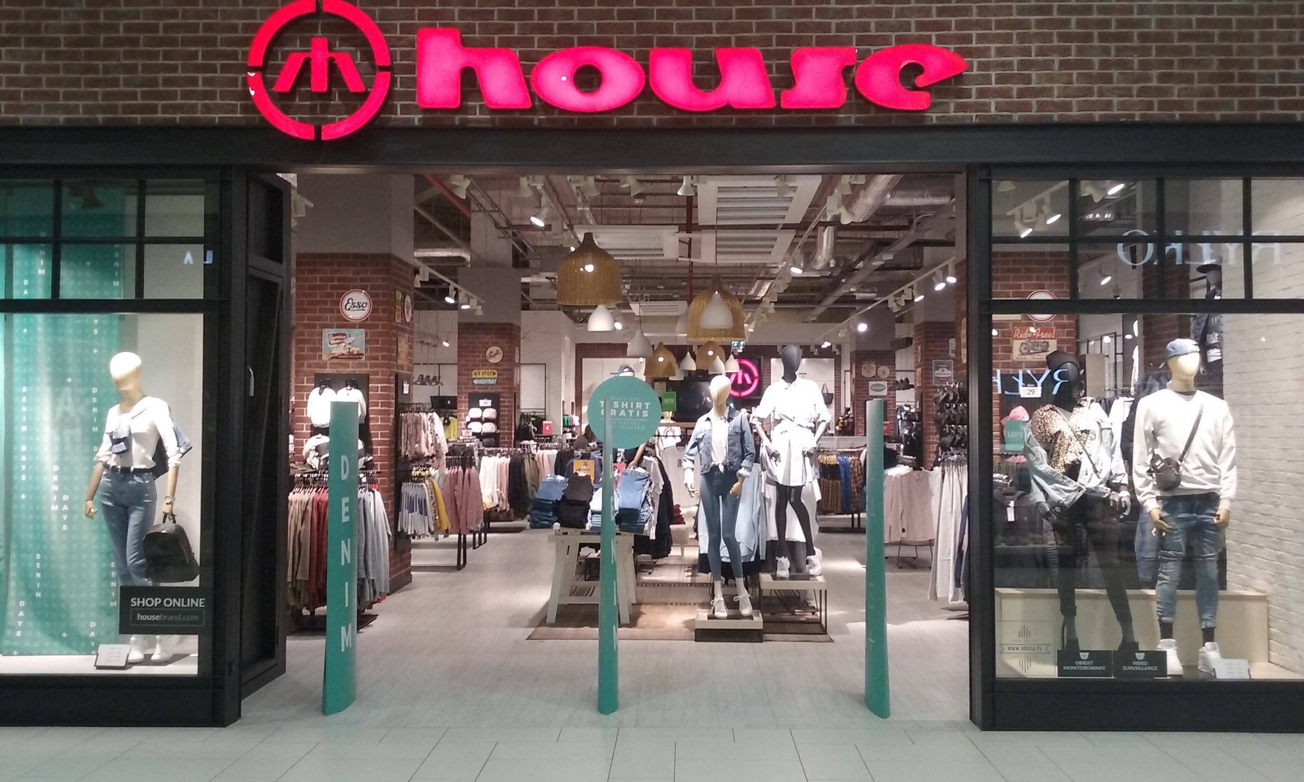 Salon odzieżowy House (LPP) w 60-tysięcznym Tomaszowie Mazowieckim